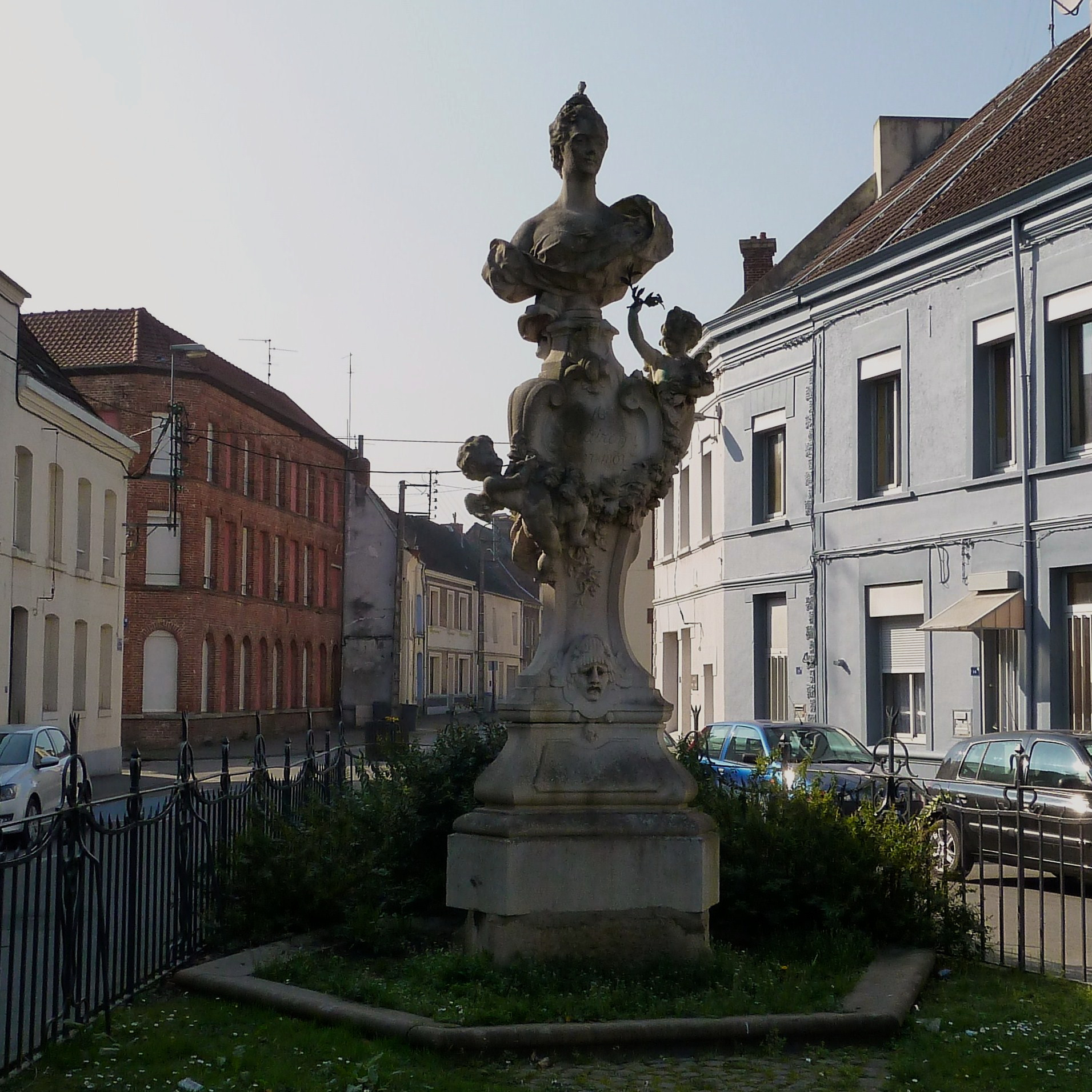 Monument commémoratif de la tragédienne Hippolyte Clairon, dit Monument de la Clairon Condé-sur-l’Escaut, Nord.- Nord-Pas-de-Calais